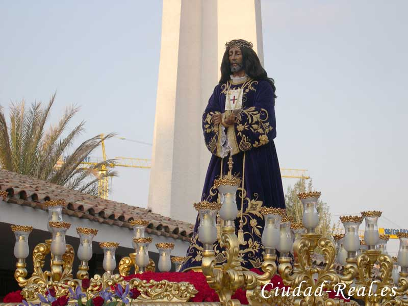 Paso de Jesús de Medinaceli